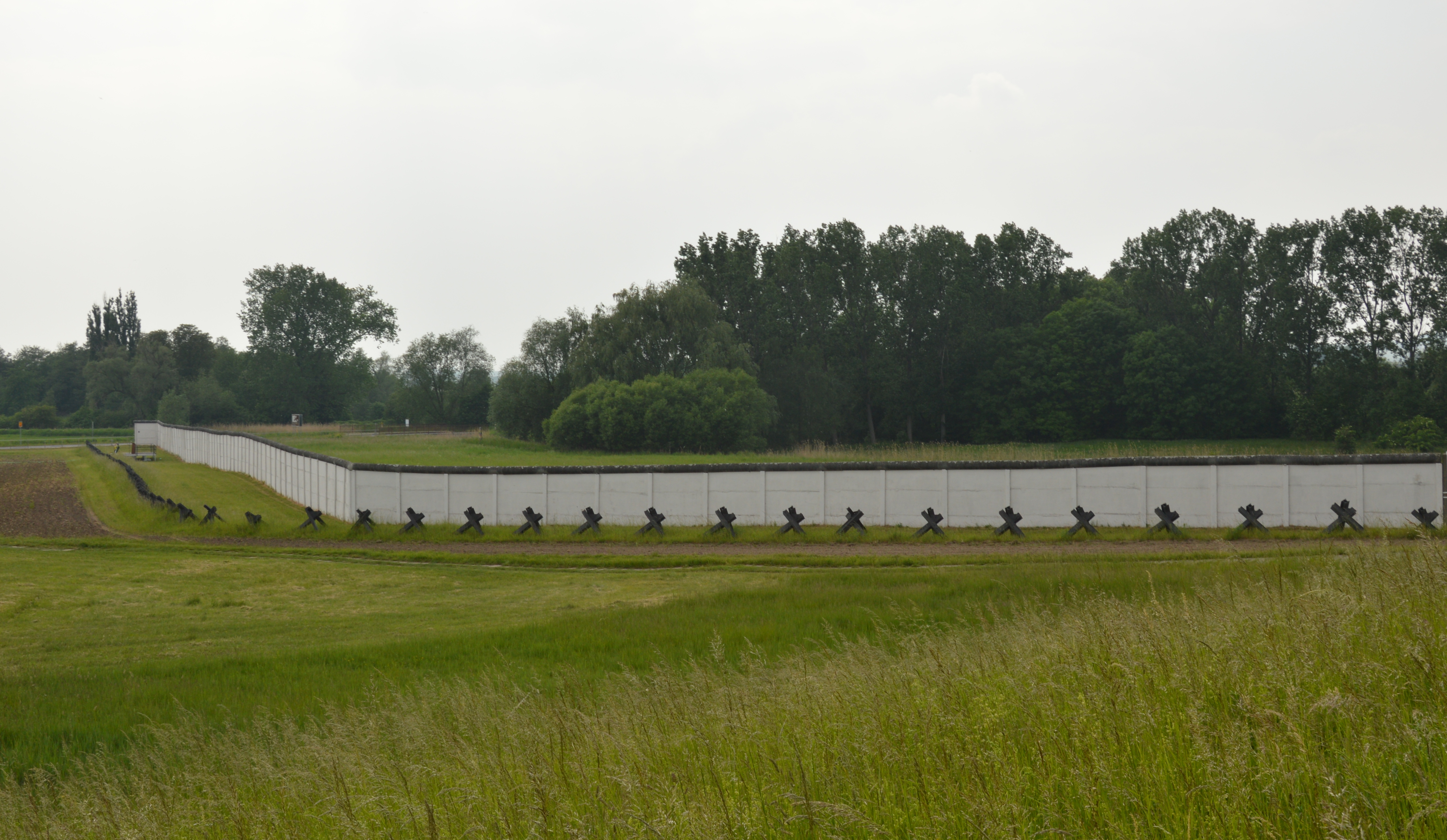 Grenzmuseum Hötensleben